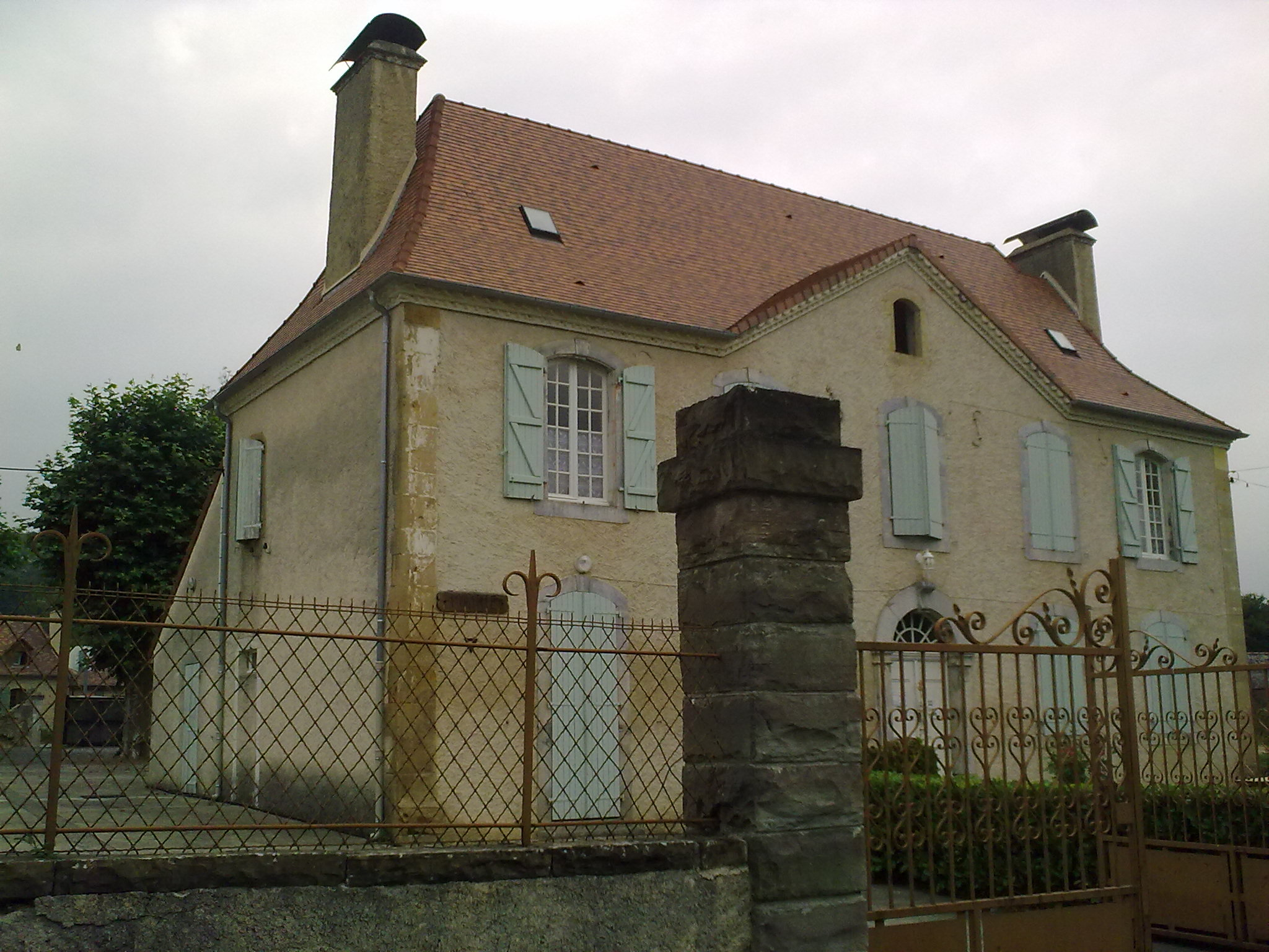 Mairie de Anoye